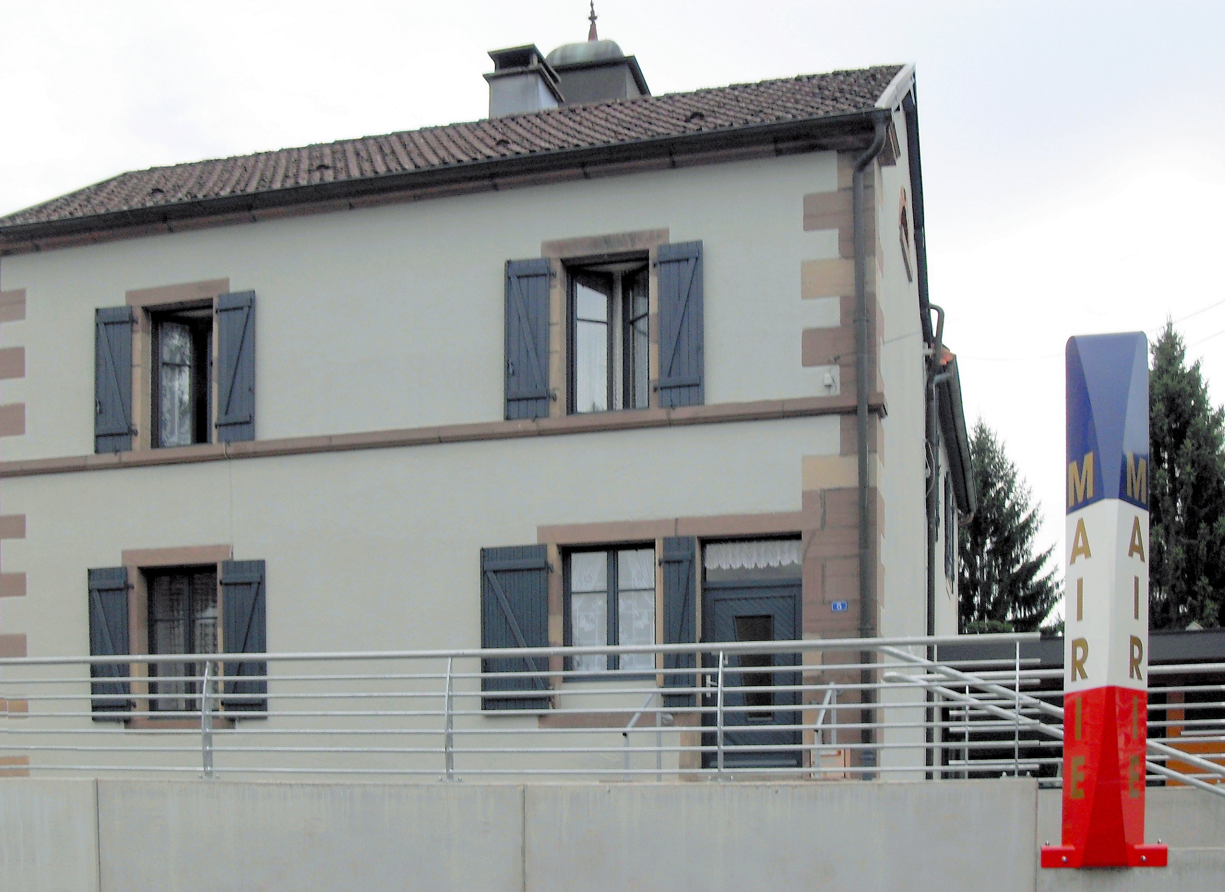 La mairie de Linexert